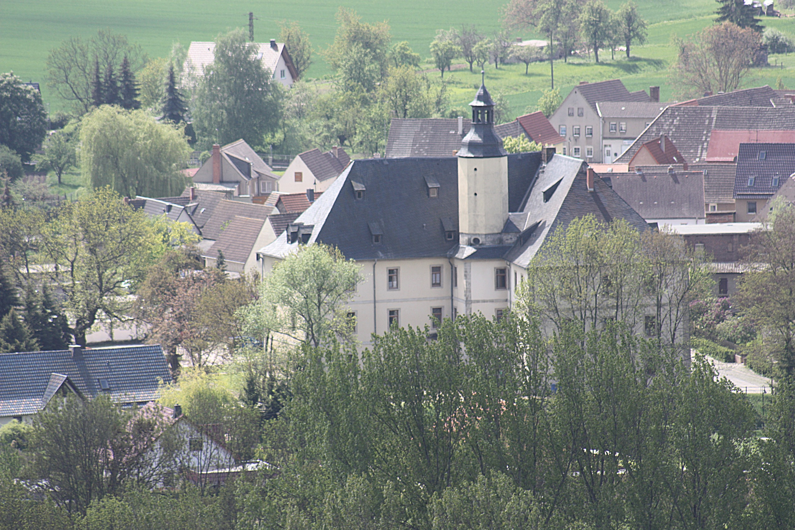 Schloss Balgstädt, Am Schloss 20, Barockbau Mitte des 18. Jh., aufgenommen mit Teleobjektiv 2010